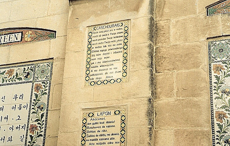 Jerozolima, kościół Pater Noster, tablice ceramiczne z modlitwą Ojcze Nasz (m.in. w języku kaszubskim)